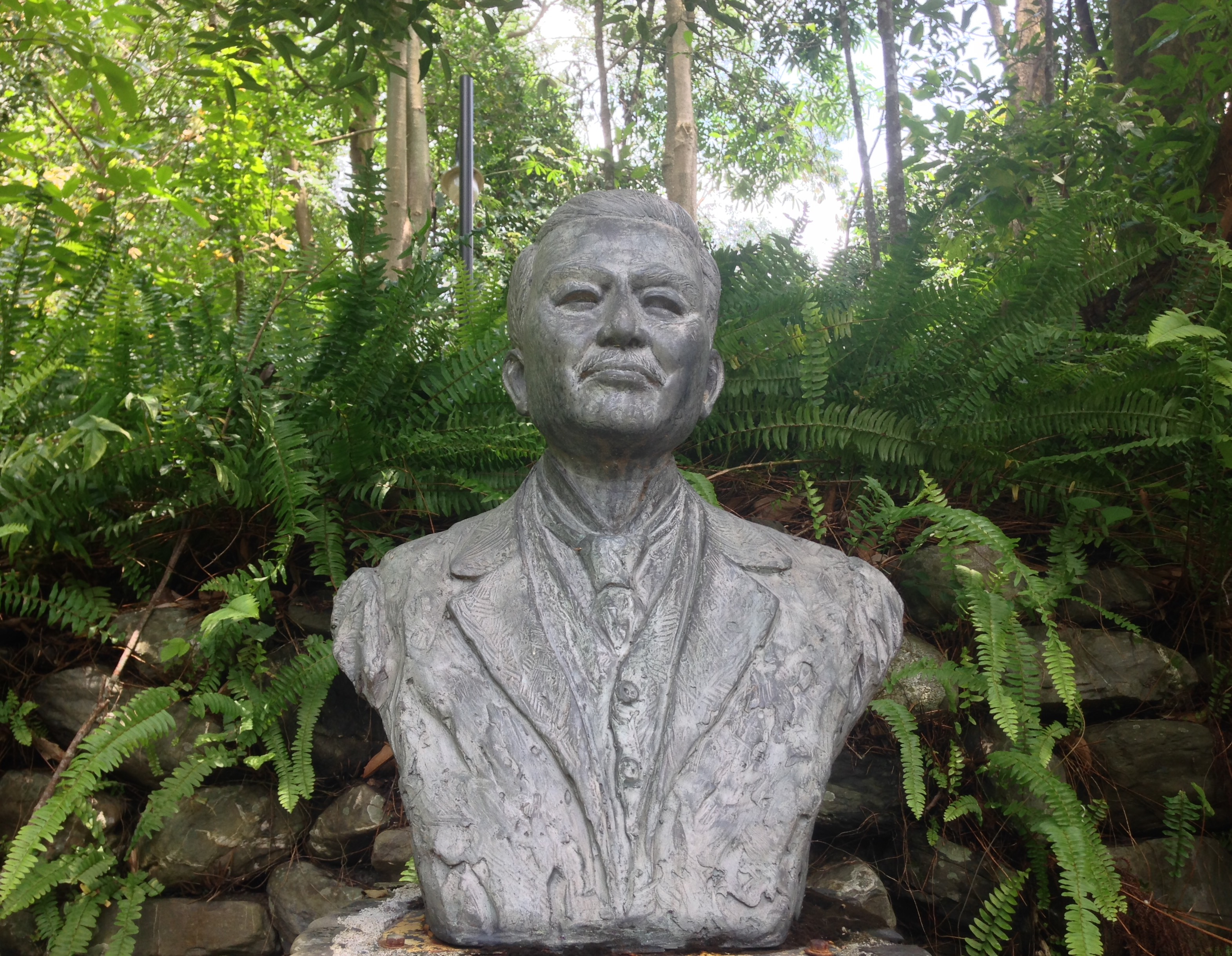 中文（台灣）: 喜樂發發吾森林公園鳥居信平銅像